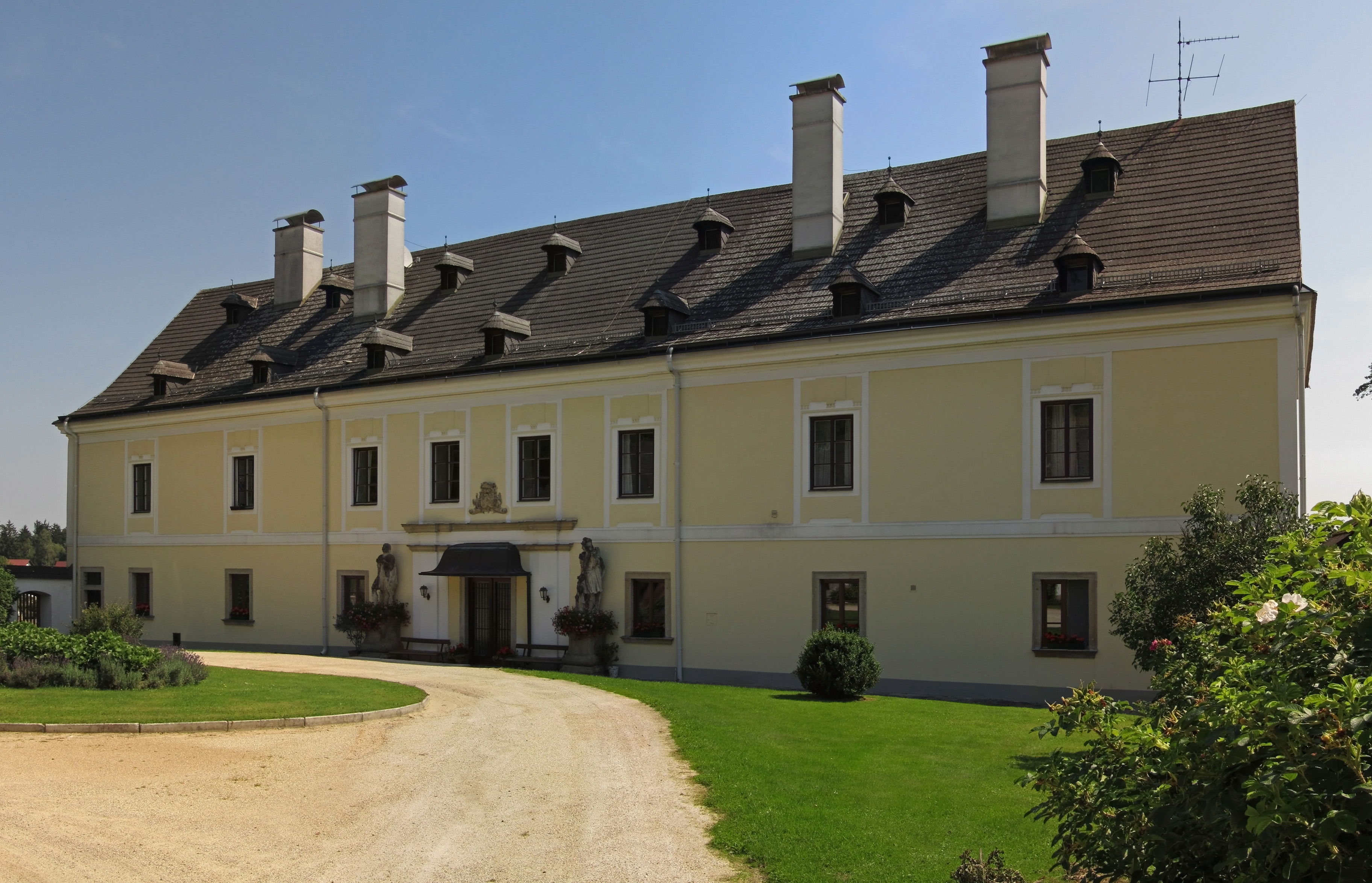 Der damalige Grundherr Christian August von Seilern ließ das Anfang des 18. Jahrhunderts erbaute barocke Schloss um 1793 als Wohnschloss umbauten.